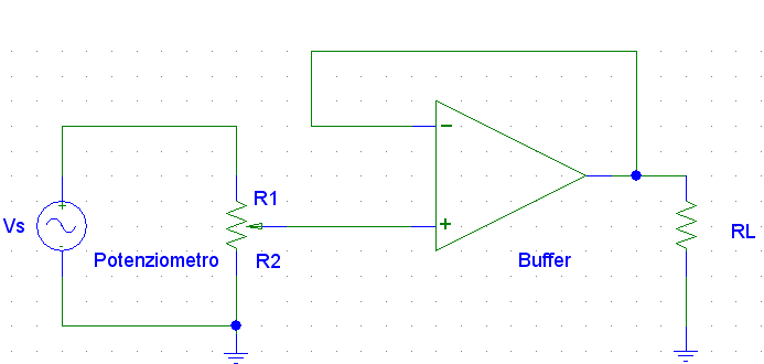 D'Errico Carmine Fatto da me medesimo al computer GDFL e Creative Commons 2.5 nessuna nota